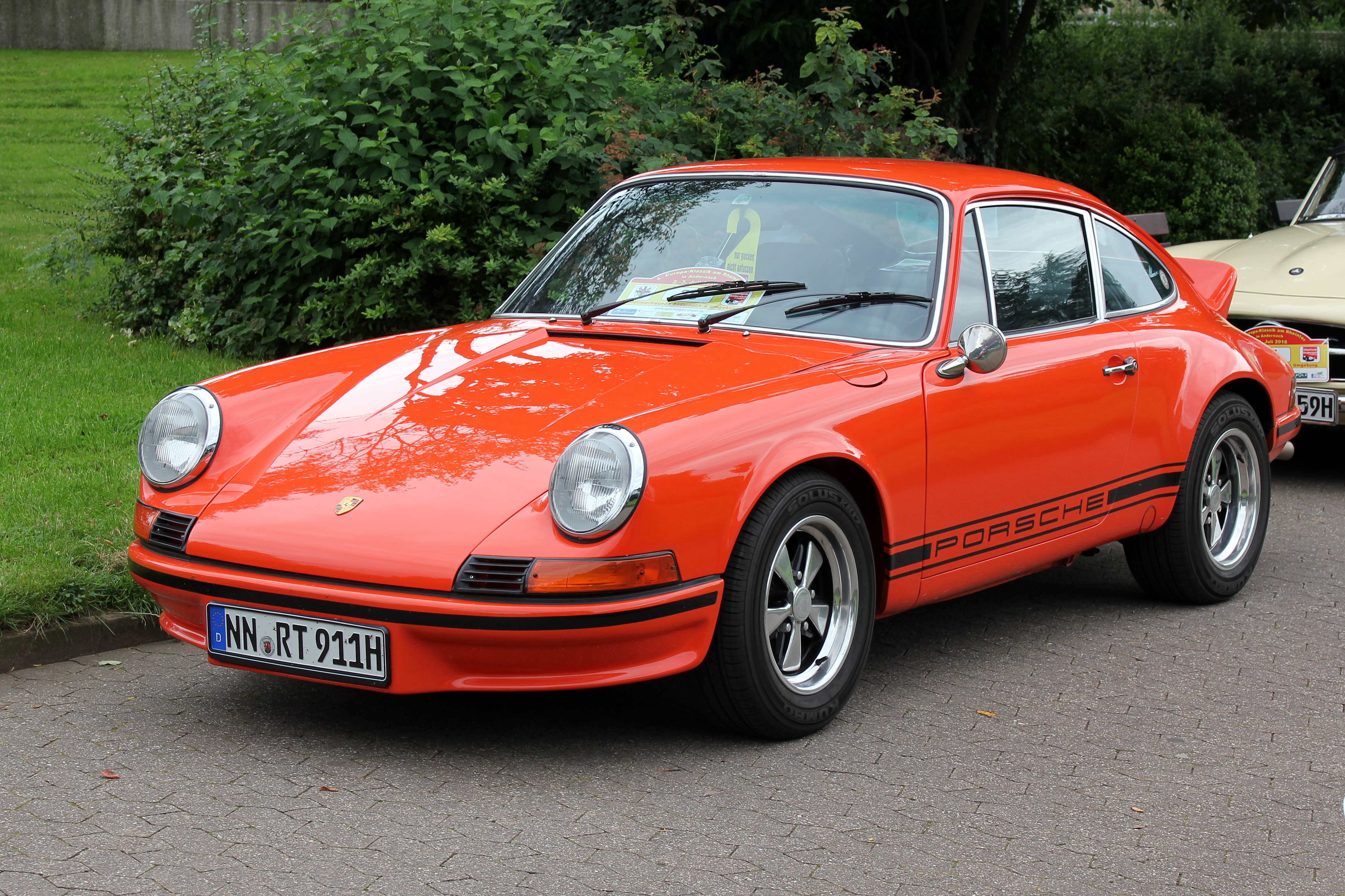 Porsche 911 Carrera RS 2.7, Bauzeit 1972/73 (fiktives Kennzeichen)